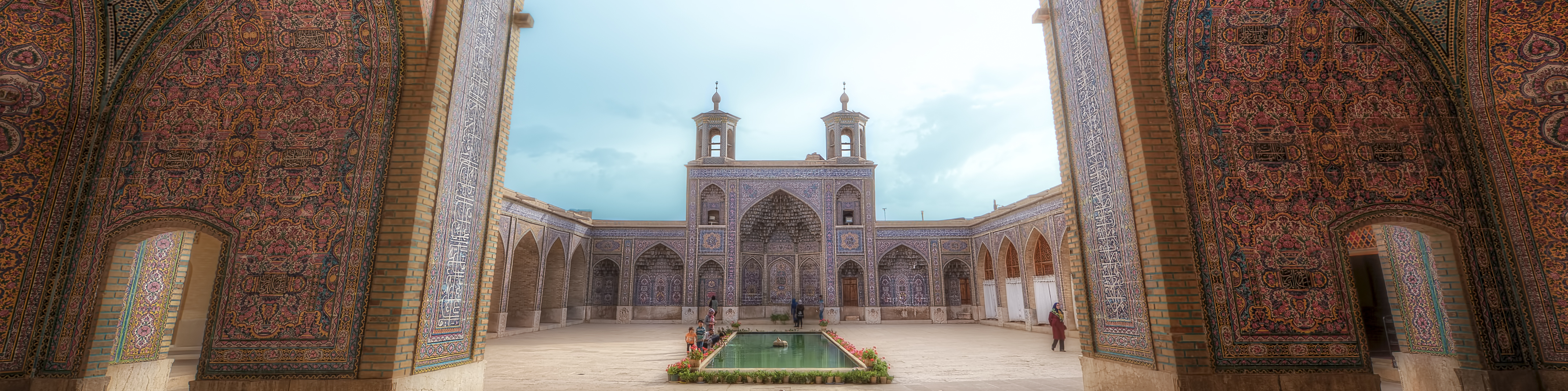 مسجد نصیر الملک